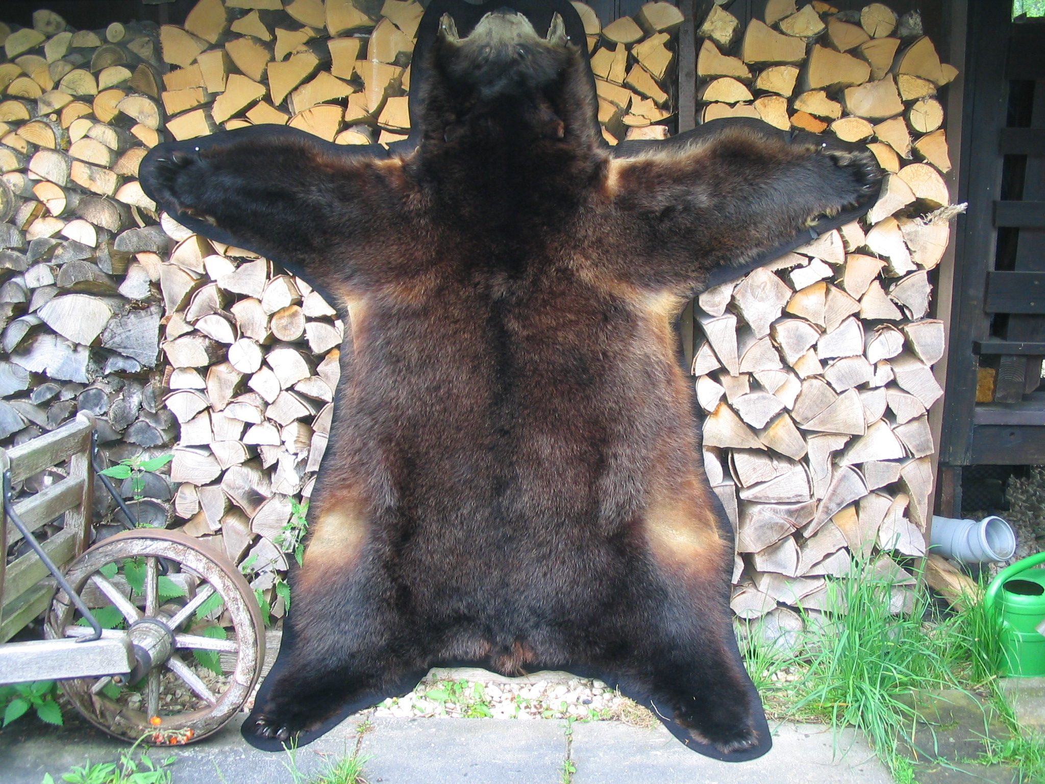 Schwarzbärfell. Provenienz Alaska Range. Erlegt 2000 durch Karl Friedrich Herold